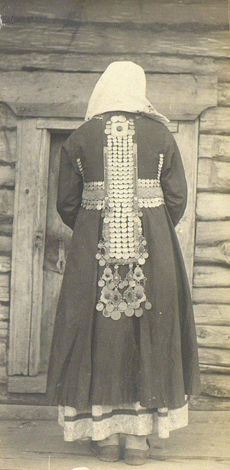 Элемент башкирской национальной одежды - иңһәлек или елкәлек